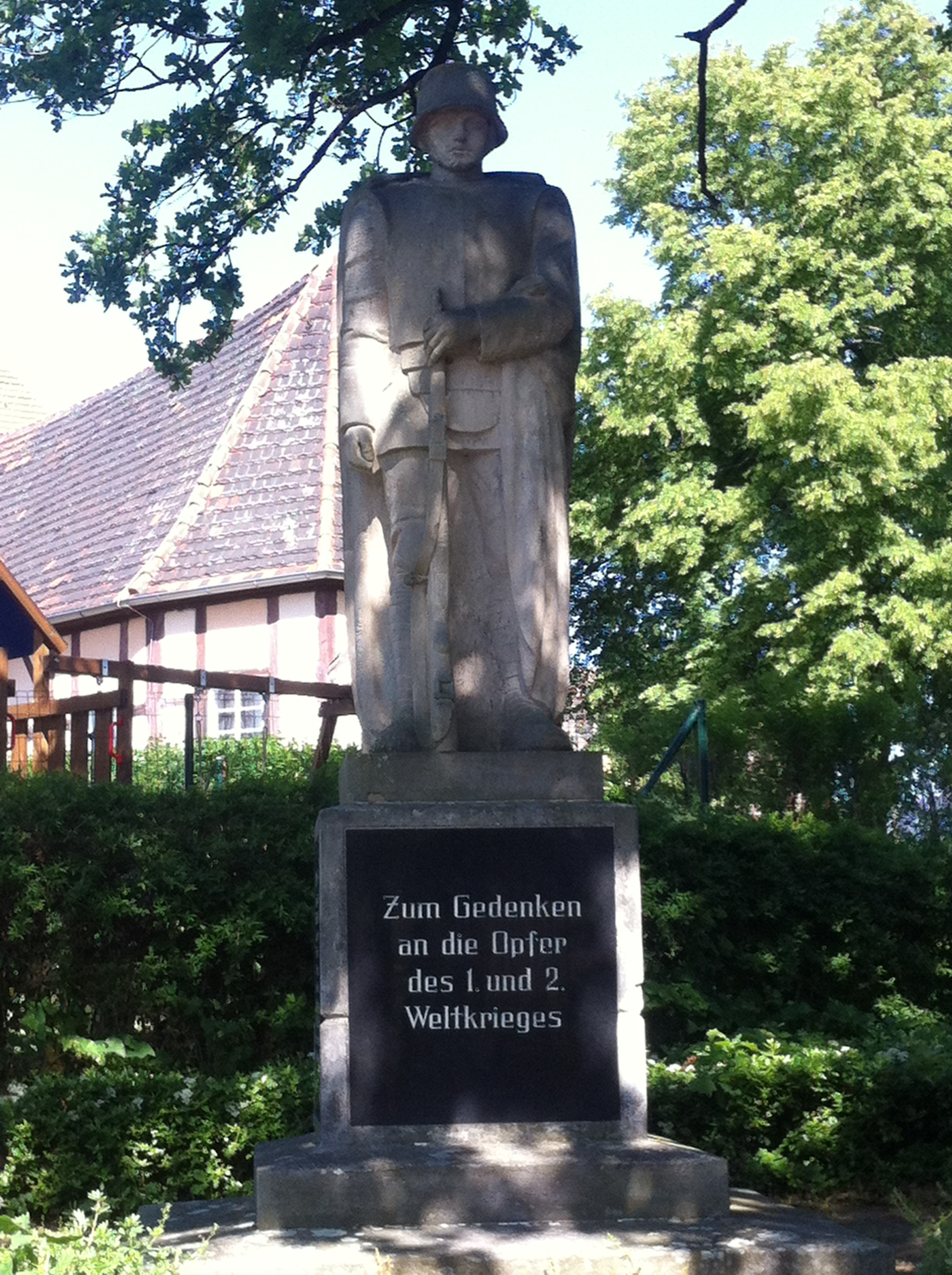 denkmalgeschütztes Kriegerdenkmal für die Gefallenen des 1. und 2. Weltkriegs in Kleindröben; OT von Jessen (Elster)